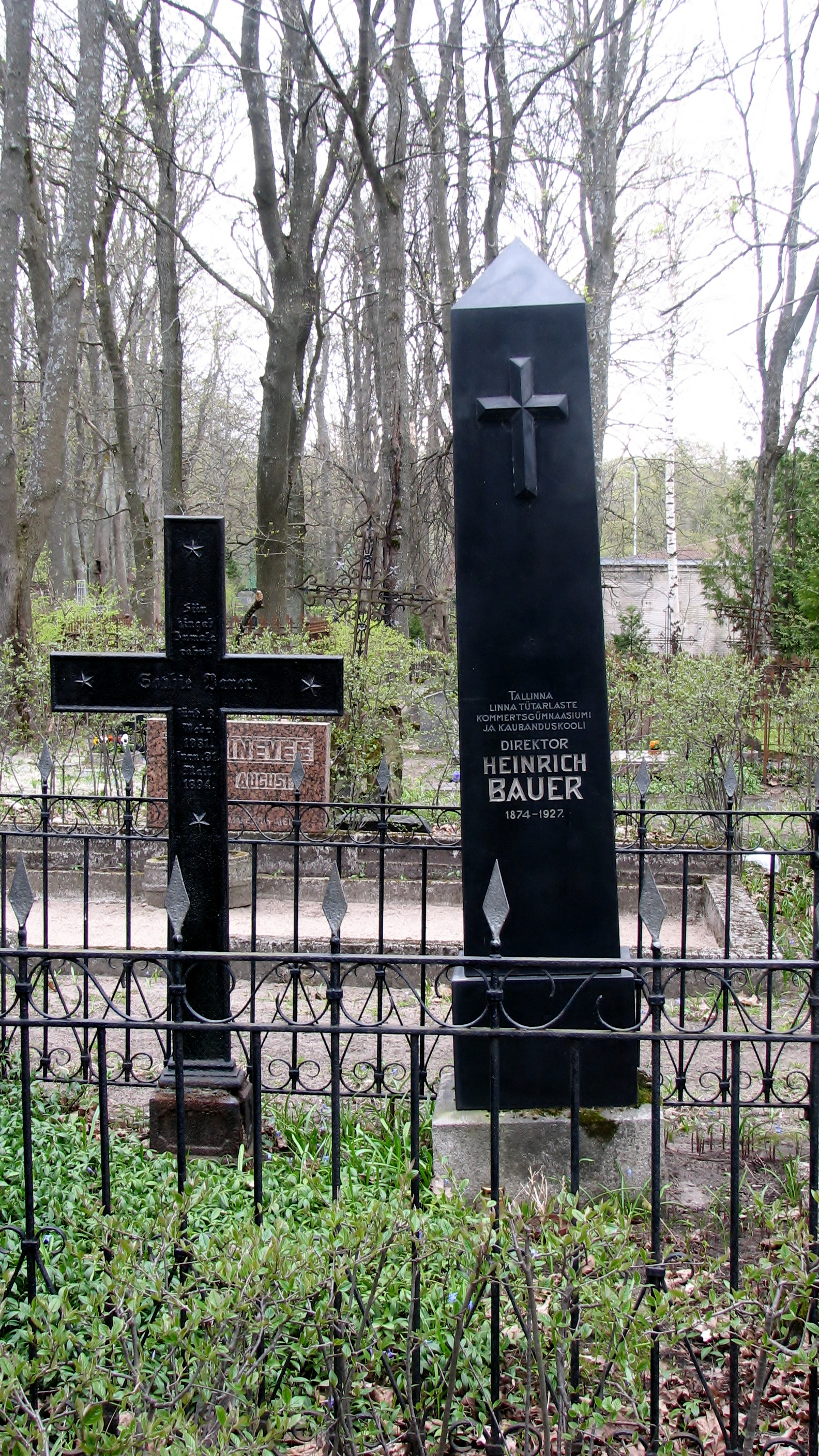 Heinrich Baueri haud Siselinna kalmistul